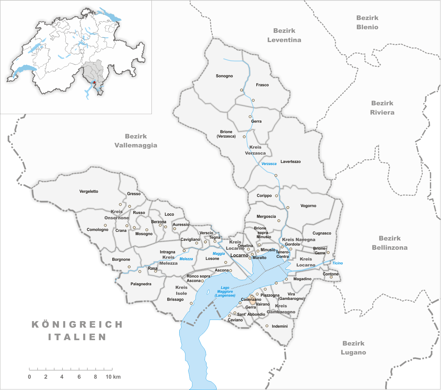 Municipality Casenzano